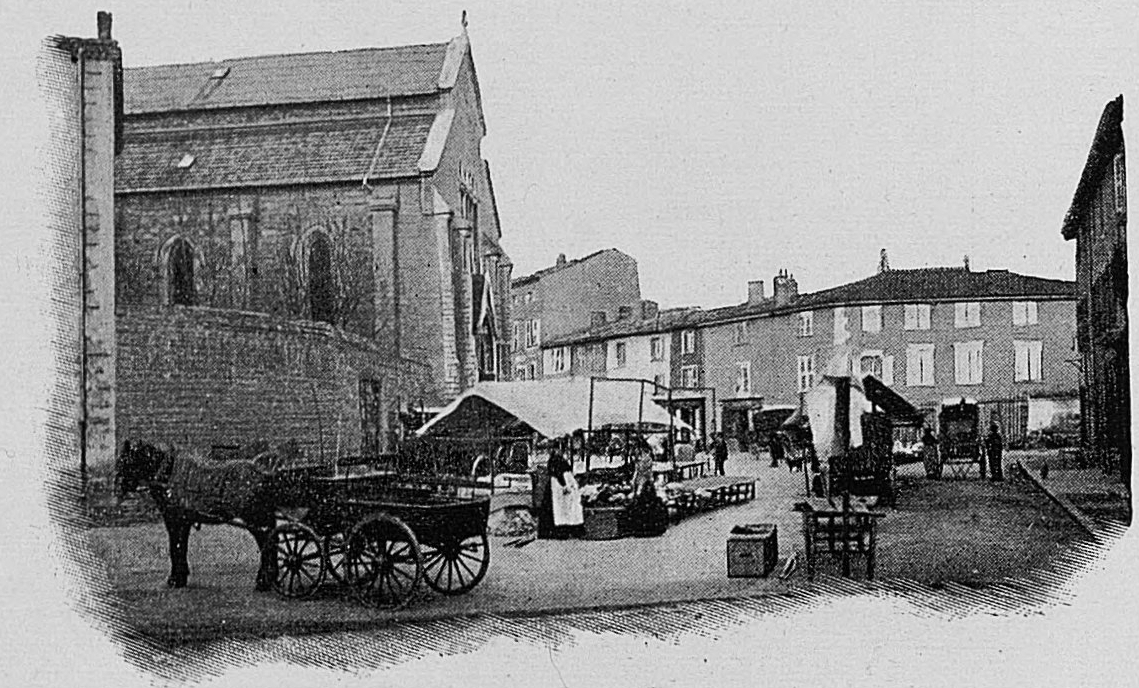 Dictionnaire illustré des communes du département du Rhône. Tome 1 / par MM. E. de Rolland et D. Clouzet.